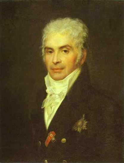 Щербатов Павел Петрович